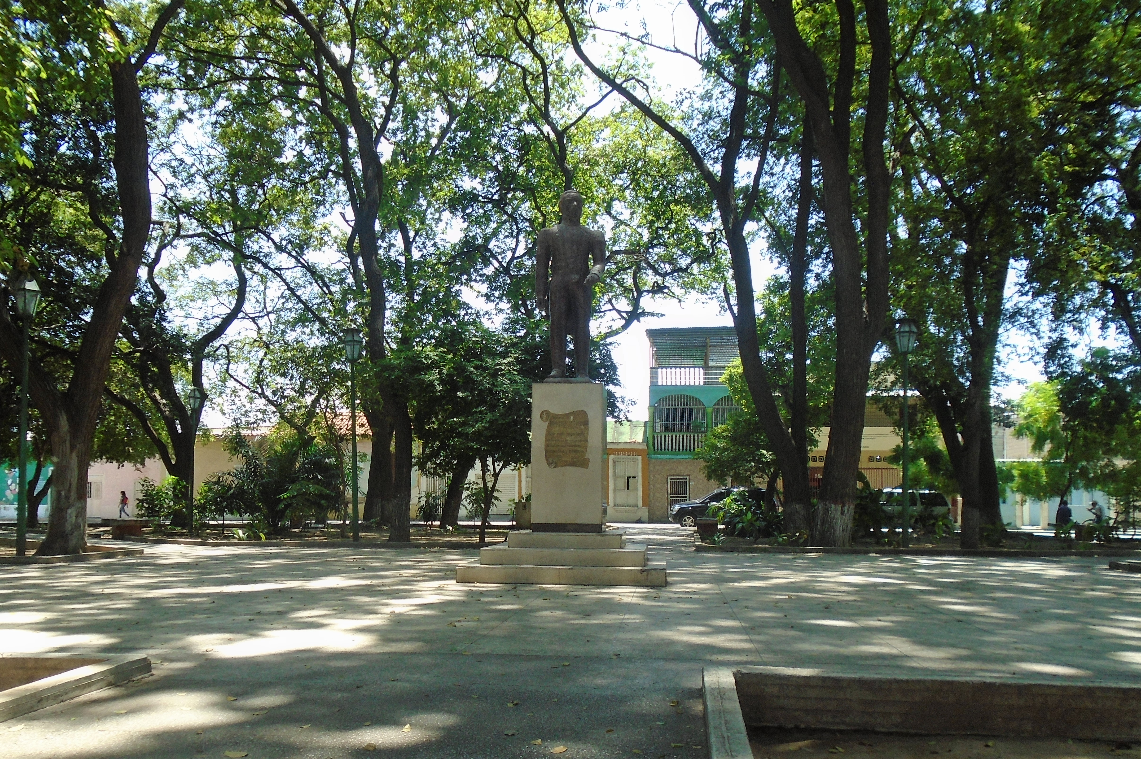 Plaza José Francisco Bermúdez, Cumaná, Sucre, Venezuela